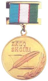 Знак Народного поэта УзбекистанаOʻzbekcha/ўзбекча: Oʻzbekiston xalq shoiri medali